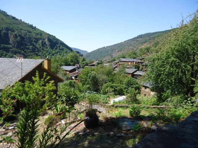 Aldea de Froxán Considerada como "Bien de Interés Cultural con categoría de Lugares de Interés Etnográfico", ubicada en el municipio de Folgoso do Courel, comarca de Quiroga, en la provincia de Lugo, Galicia, España